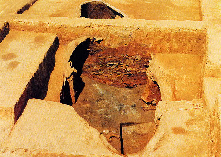 사적 제511호 진천 산수리와 삼용리 요지 (鎭川 山水里와 三龍里 窯址)